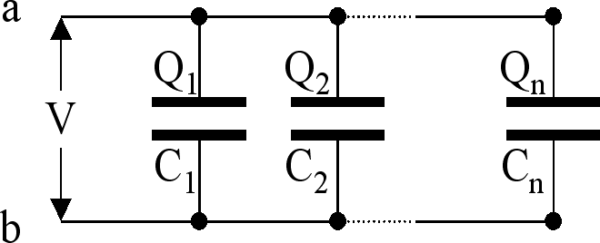 Condenser in parallel